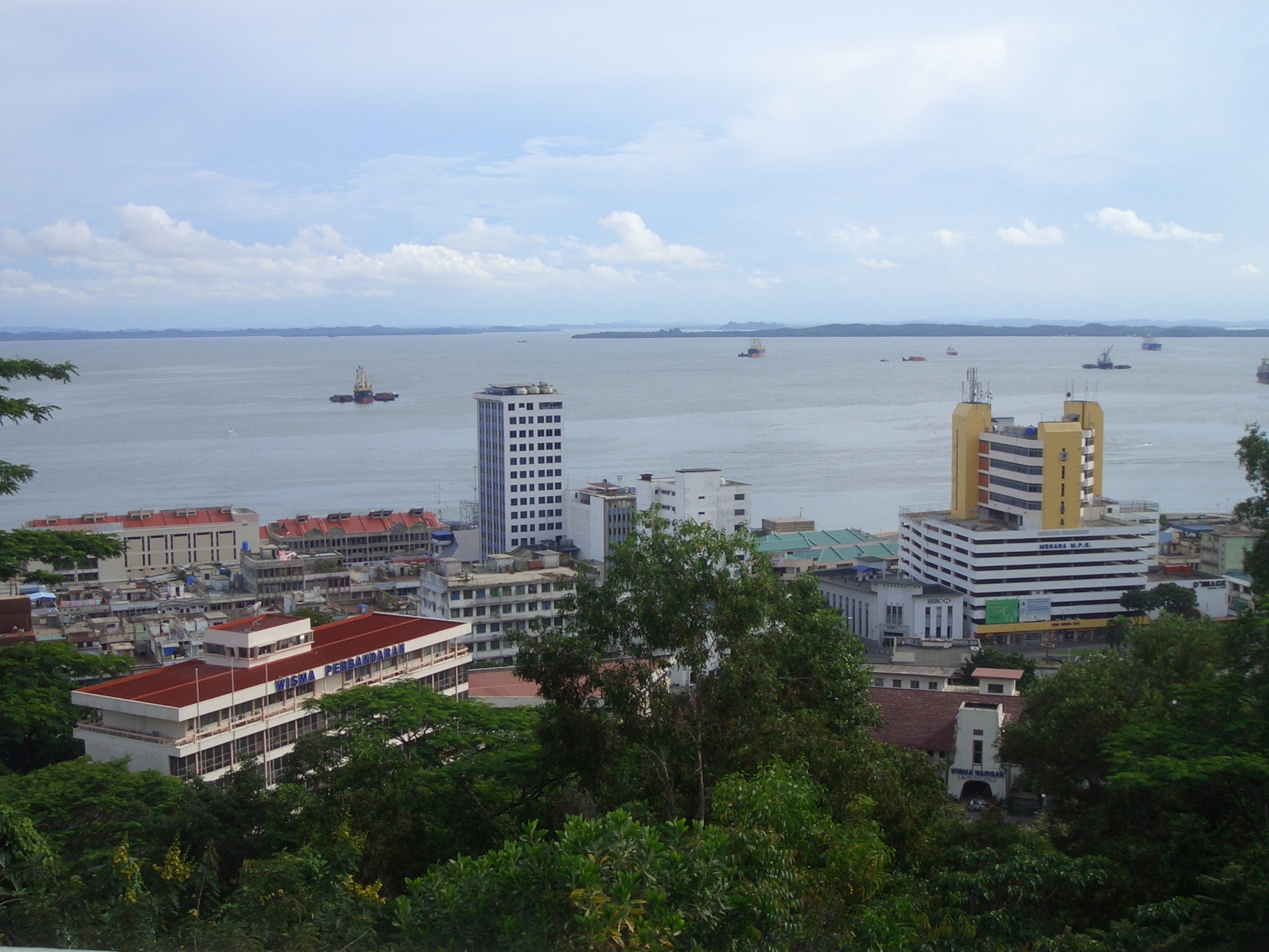 Sandakan